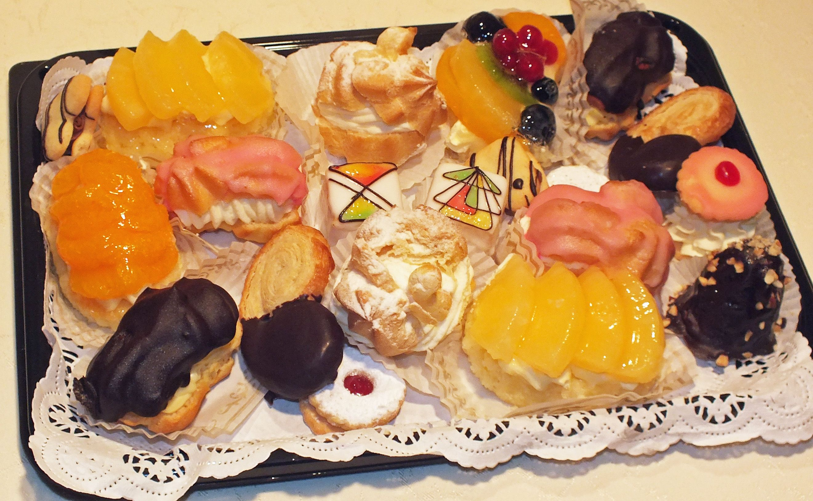 Kaffeeschüssel von einer Bäckereikette